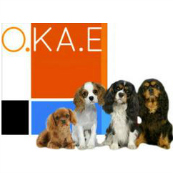 Όμιλος Κάβαλιερ Κινγκ Τσαρλς Σπάνιελ Ελλάδας